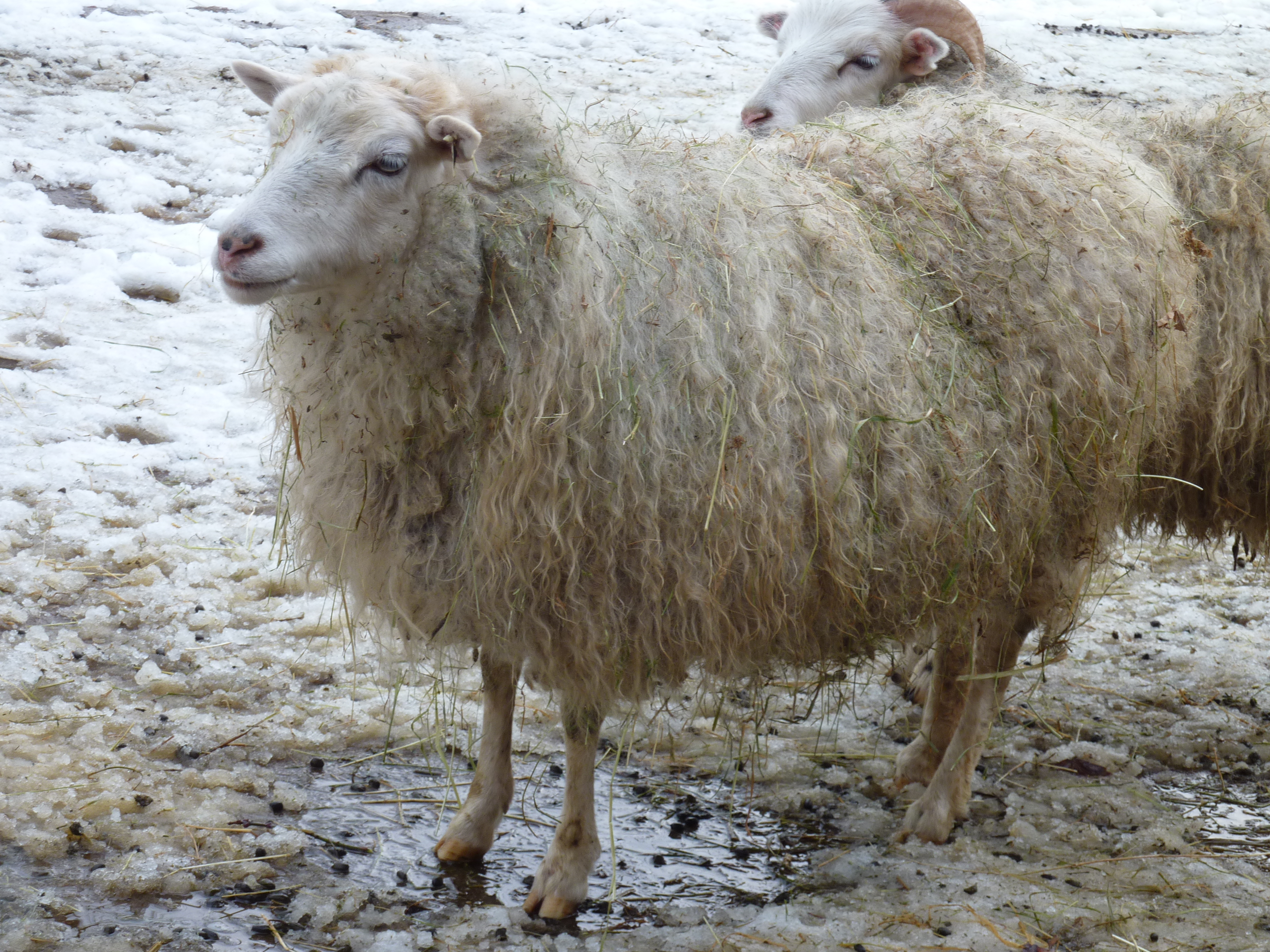 Skudde-Schaf im Schaubauernhof der Wilhelma